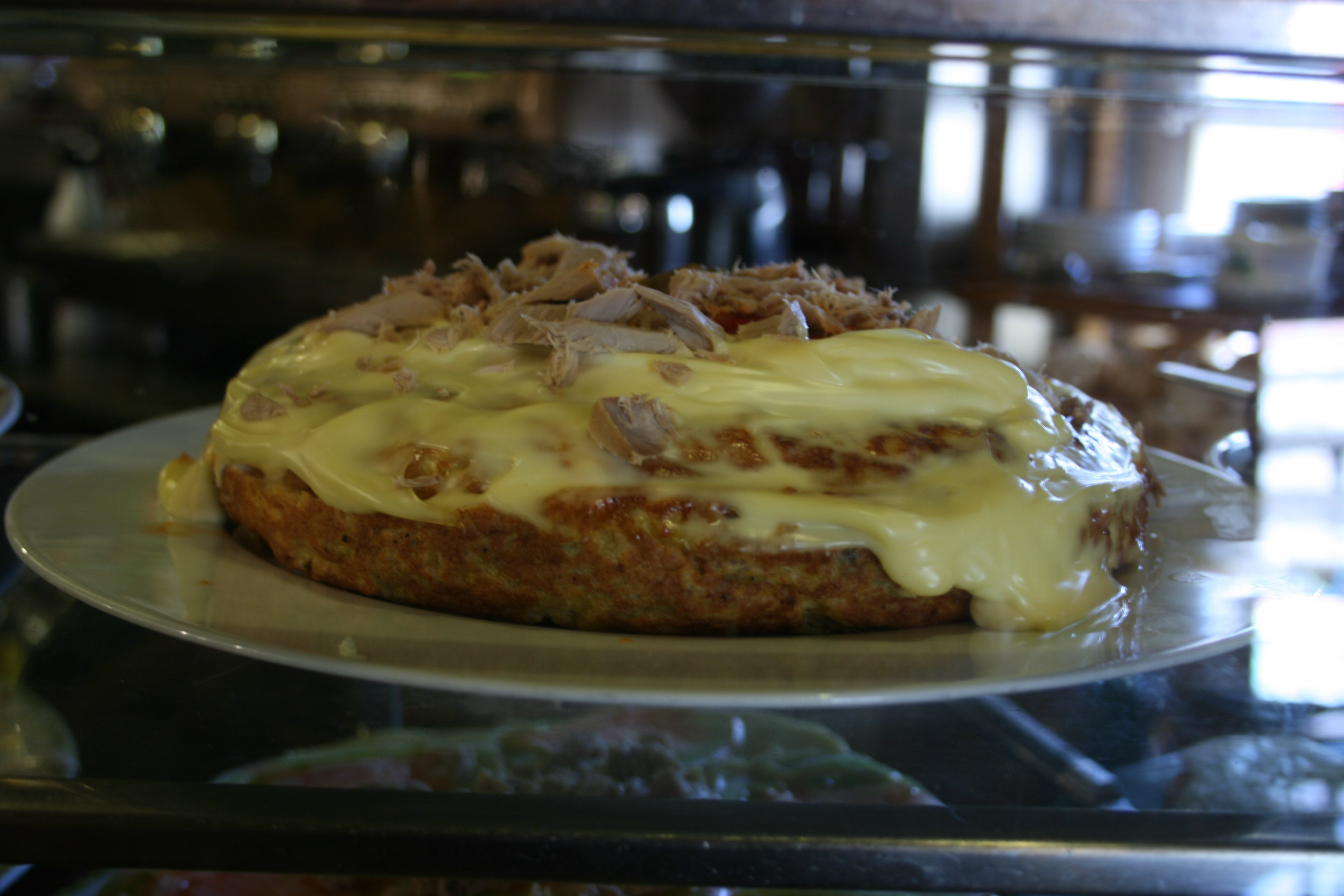 Tortilla de patatas recubierta de mahonesa y migas de atún (Salamanca - Mesón Cervantes)